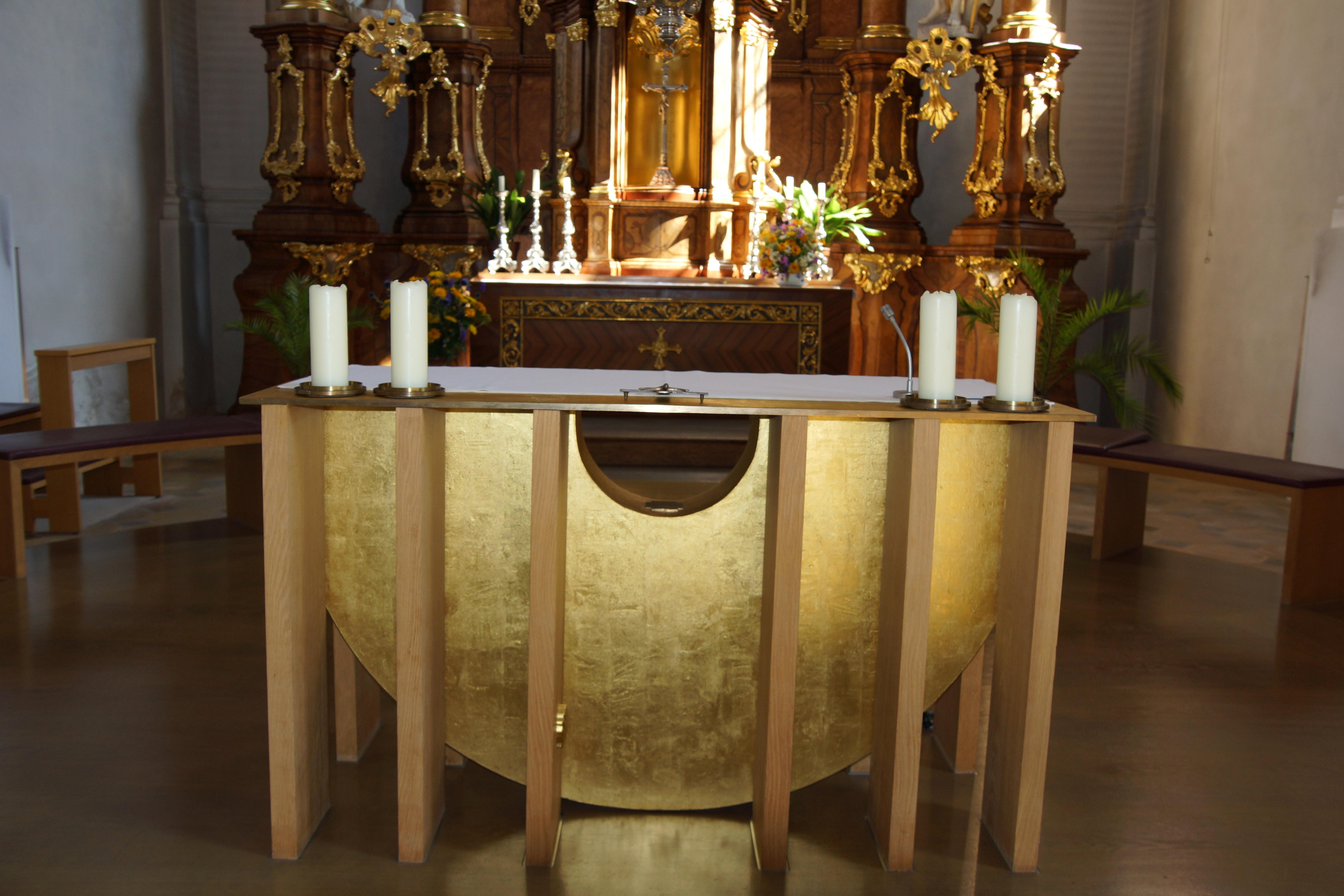 Die katholische Pfarrkirche St. Jakobus in Greding